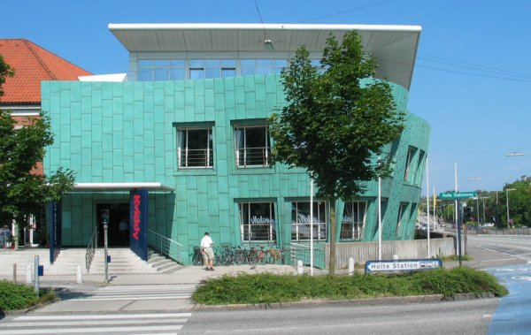 Holte Midtpunkt med Kvickly og Holte Bibliotek (Rudersdalbibliotekerne)